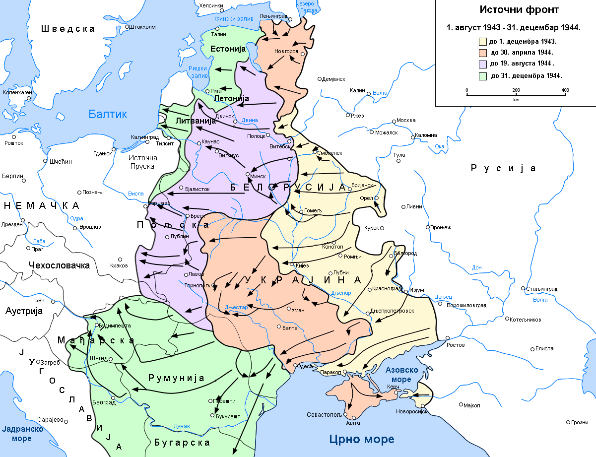 Источни фронт од августа 1943. до децембра 1944.